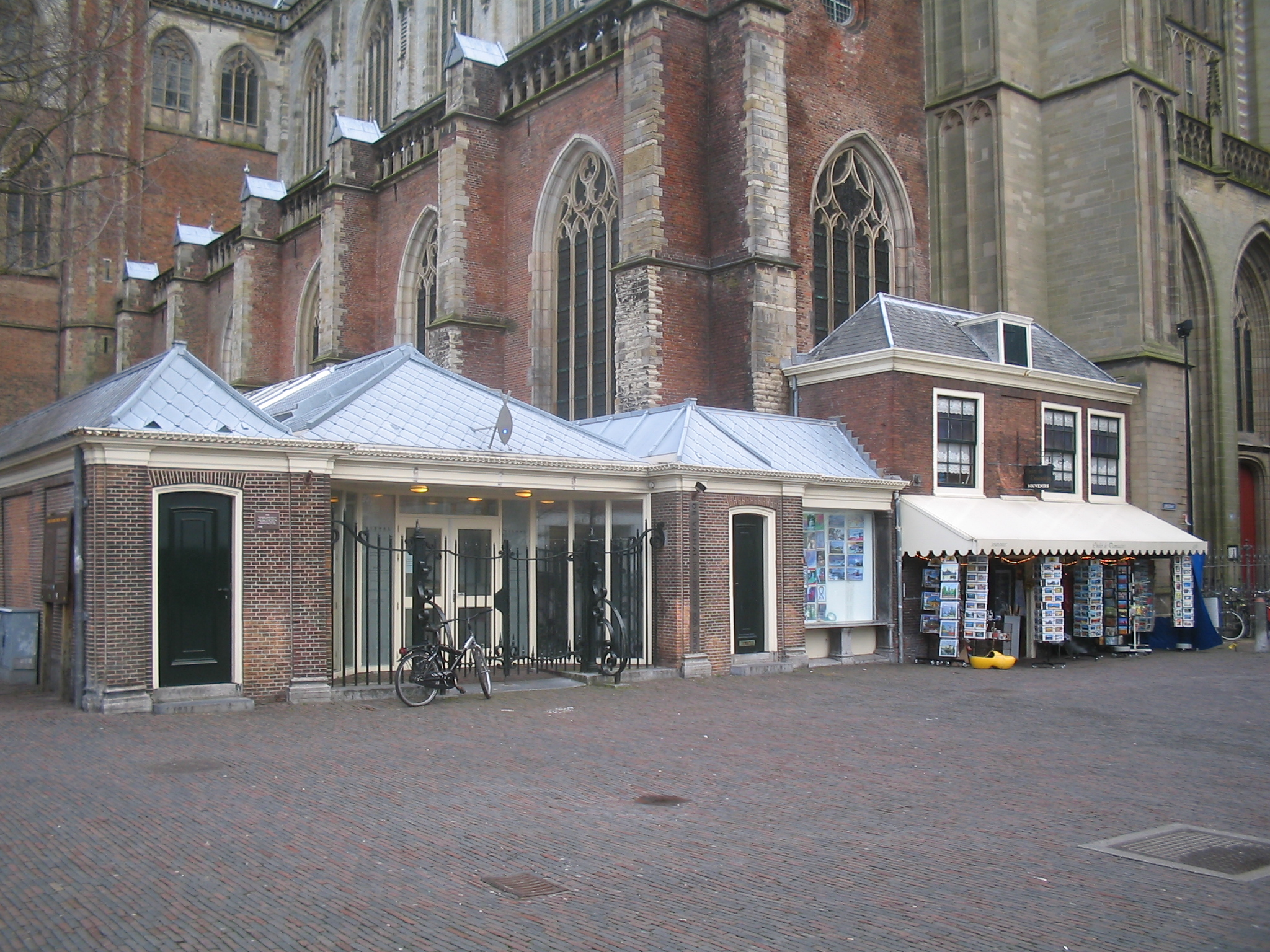 Haarlem. Vishal